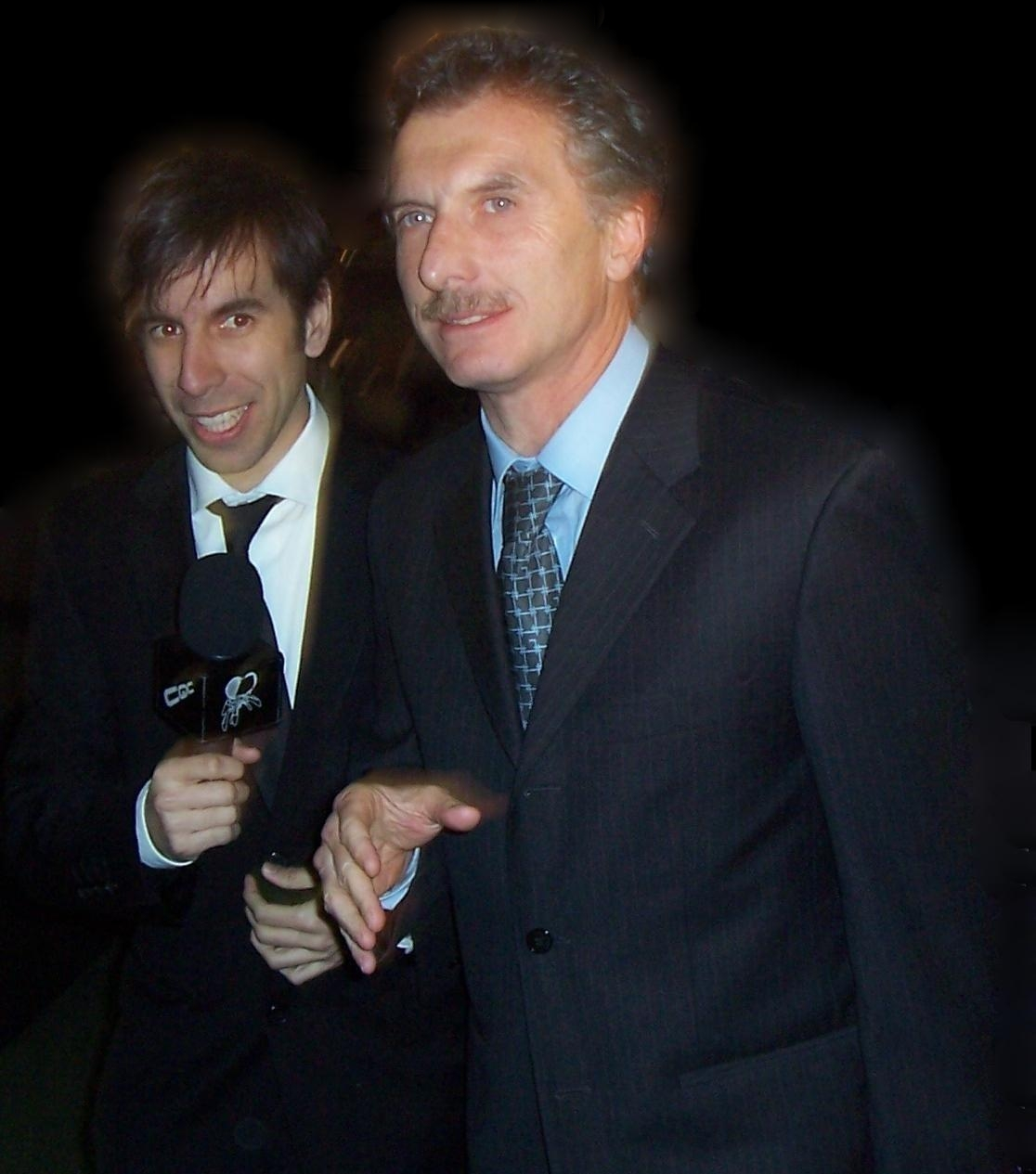 El perioditas Clemente Cancela de CQC, junto a Mauricio Macri, jefe de gobierno de la ciudad de Buenos Aires.